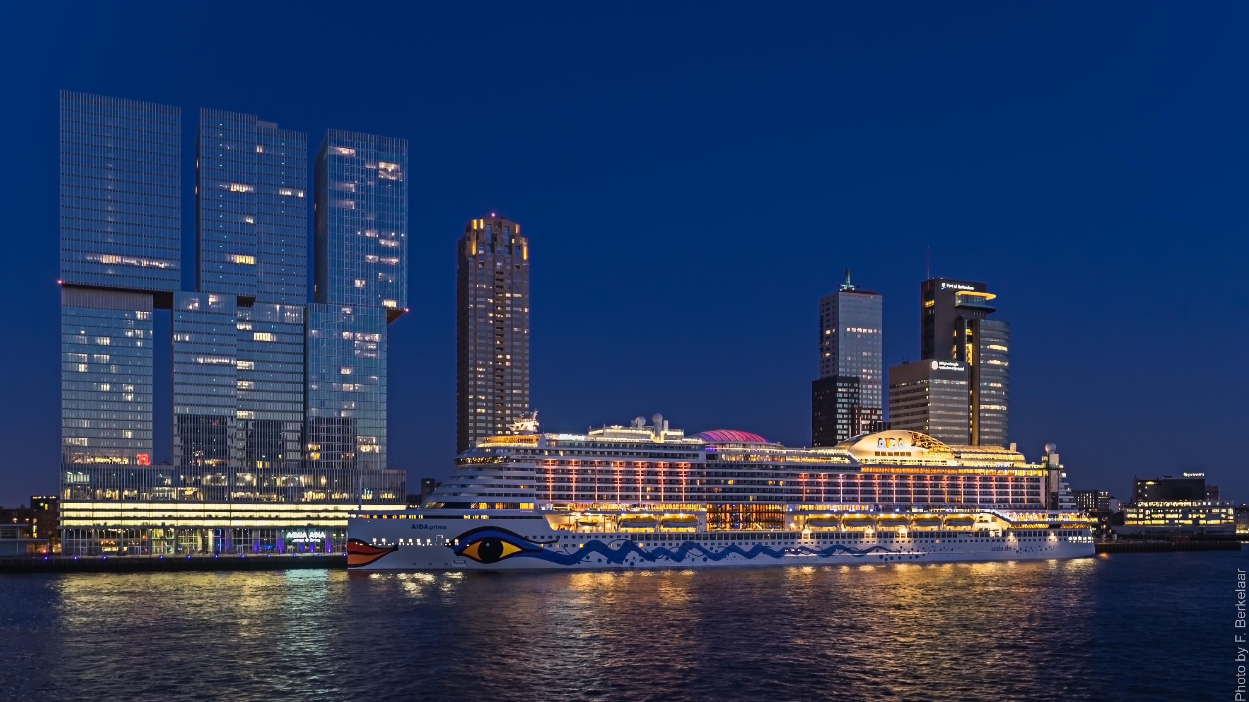 ms AIDA prima - Wilhelminakade - Port of Rotterdam